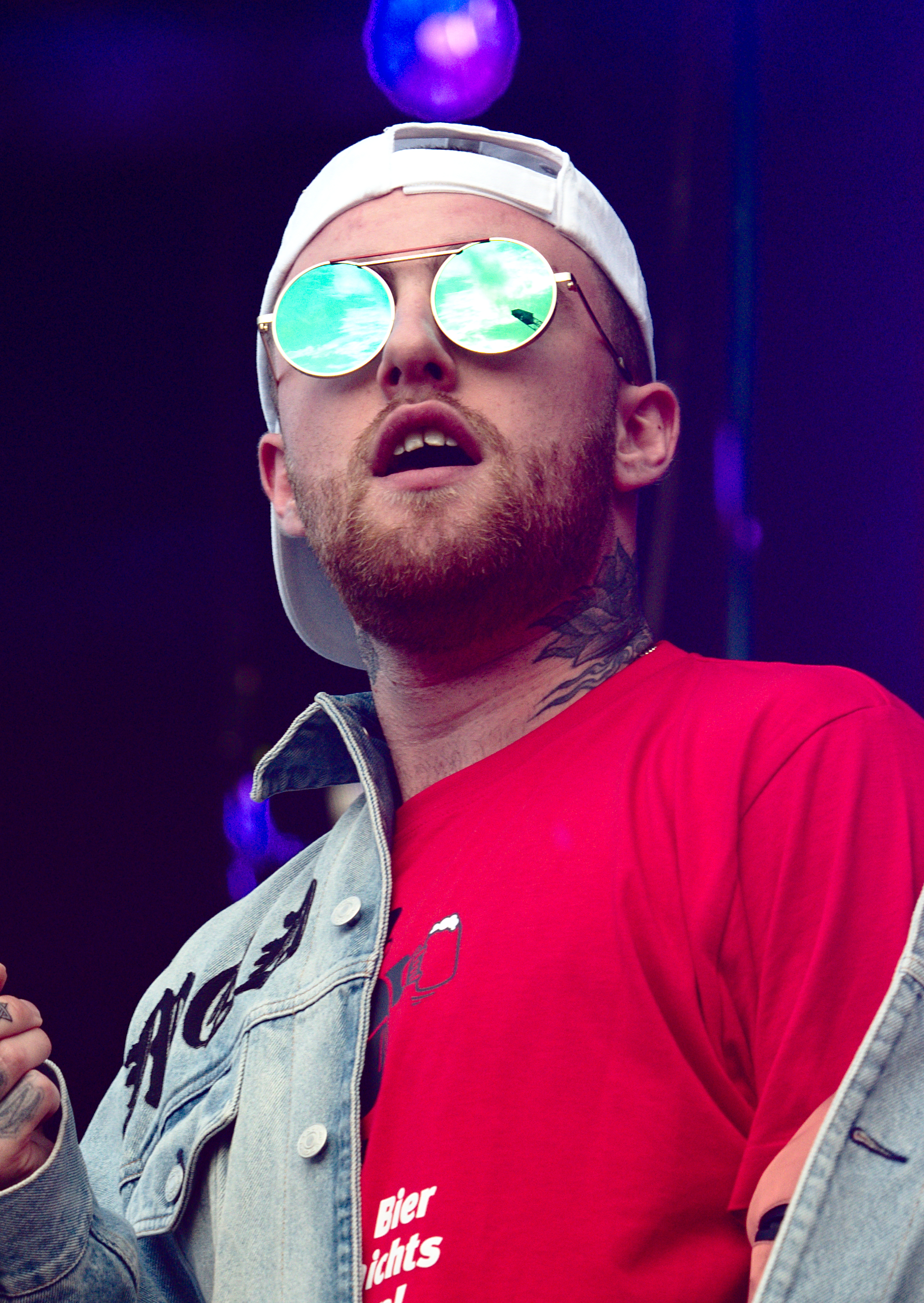 Der US-amerikanische Rapper Mac Miller beim splash! Festival 20 (2017).